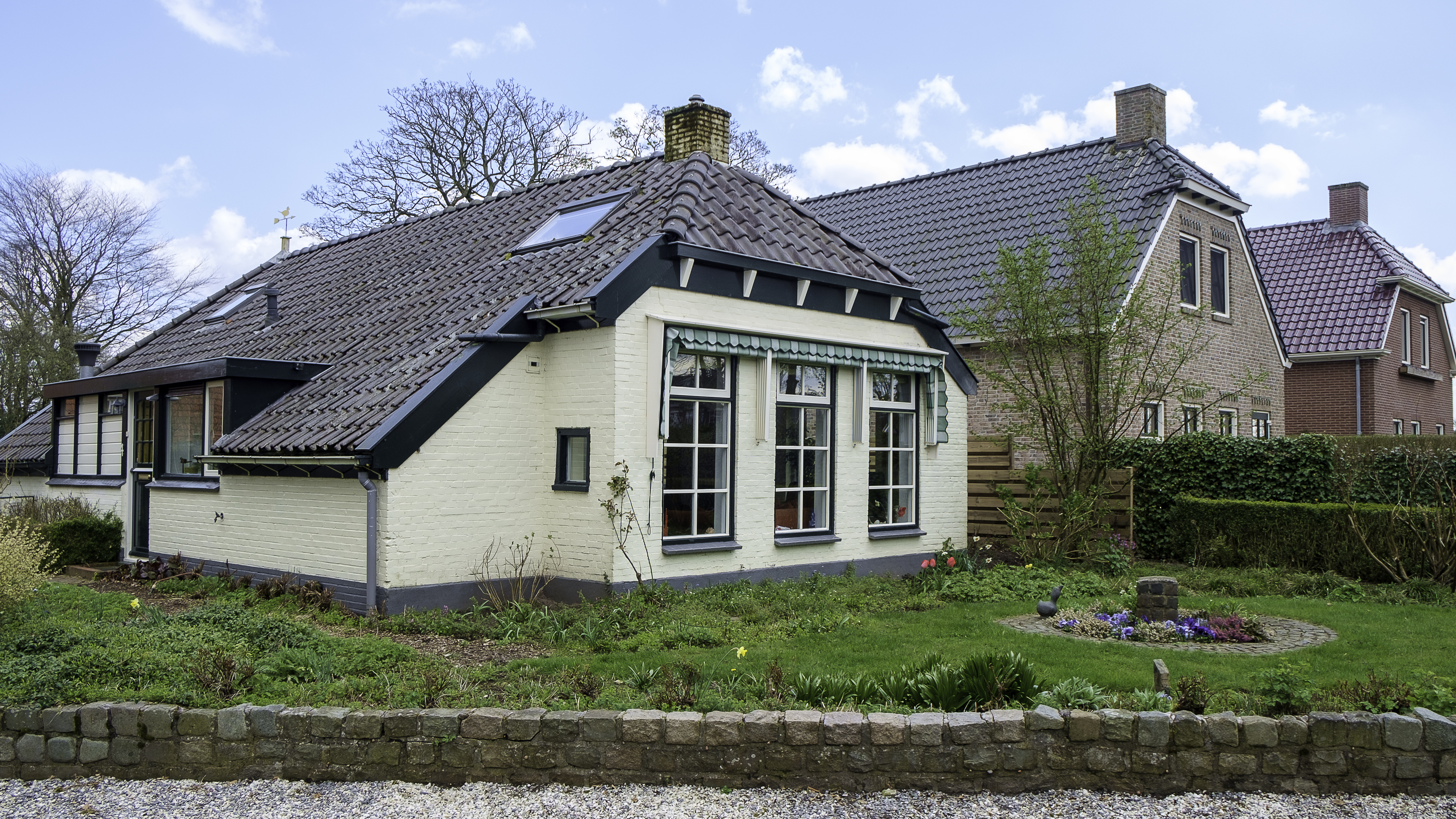 Zuiderstraat 4 in Noordlaren. Het witte huisje is de enige overgeblevene van 3 arbeiderswoningen uit 1924. 2 identieke huisjes aan rechterzijde werden in 1966 gesloopt.